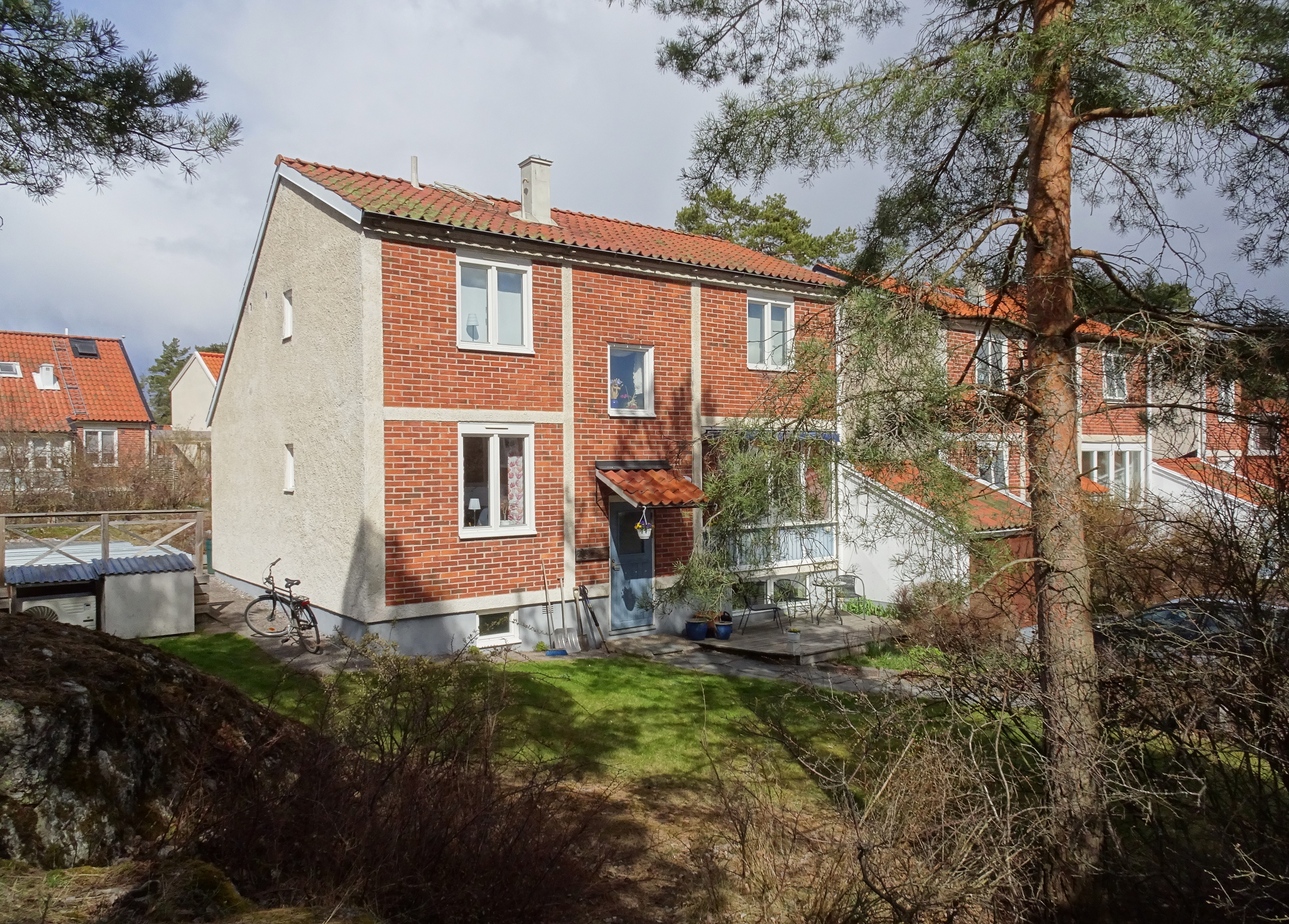 Kedjehus vid Hasselgränd, Vällingby, arkitekt Backström & Reinius, Nybyggnadsår 1958 - 1966